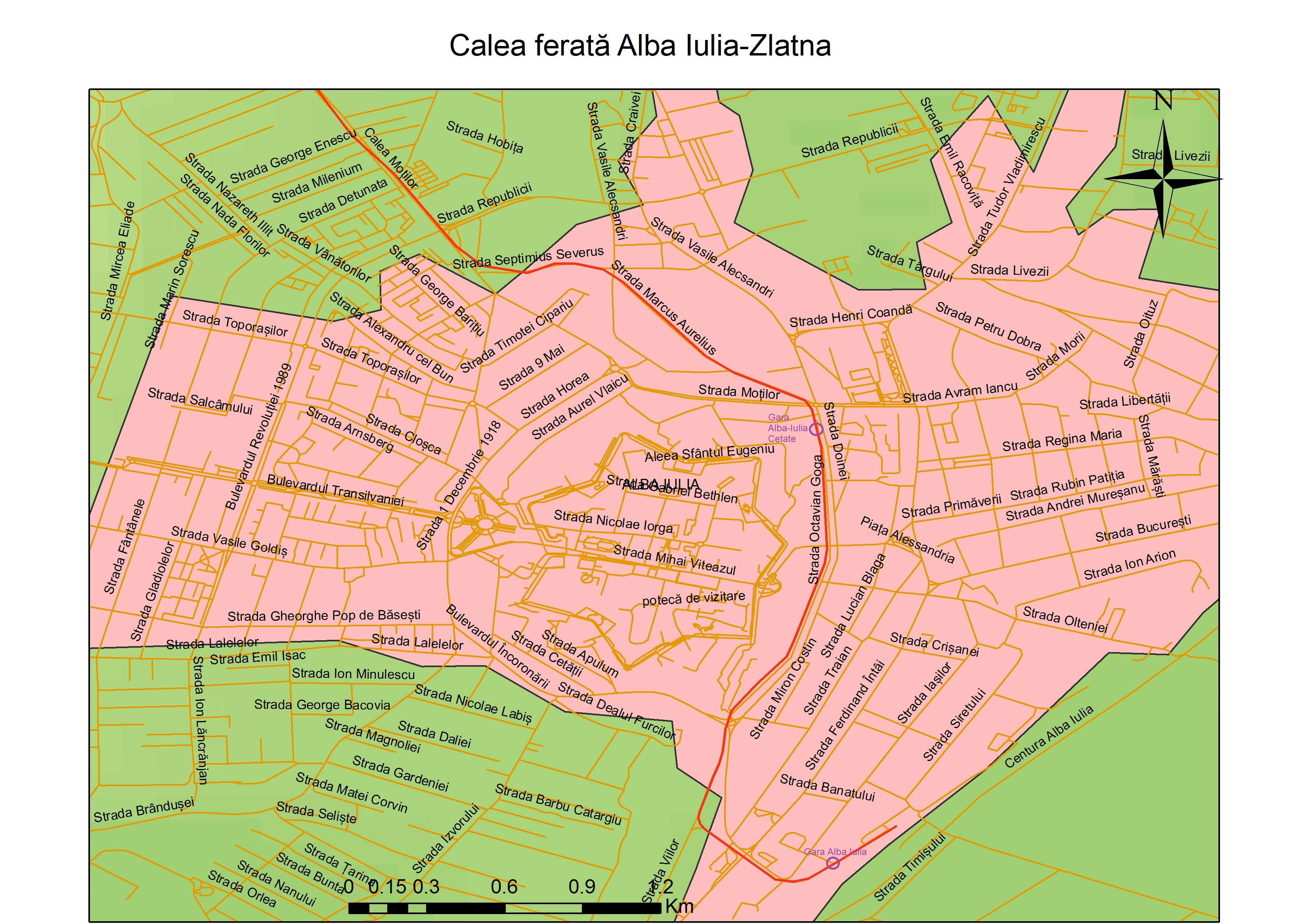 Traseul căii ferate prin interiorul municipiului Alba Iulia, traseu dezafectat în anul 1981